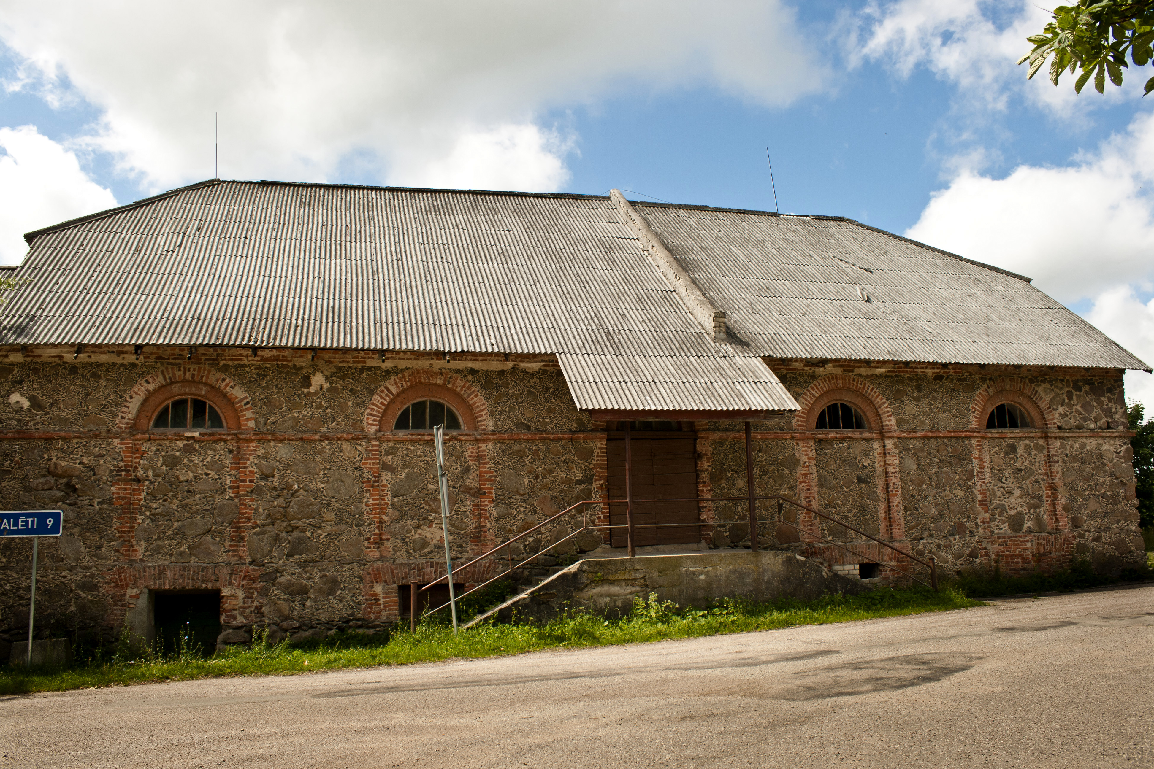 Barn in Purmsāti